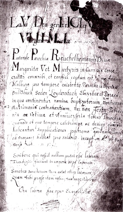 1. Seite der Matrikel Pfarrei St. Margaretha in campis (1672), früher im Pfarrarchiv Obernau, jetzt Diözesanarchiv Würzburg. Inhalt = Daten und Ereignisse von Ruchelnheim von Pfarrer Adam Mahlburg.